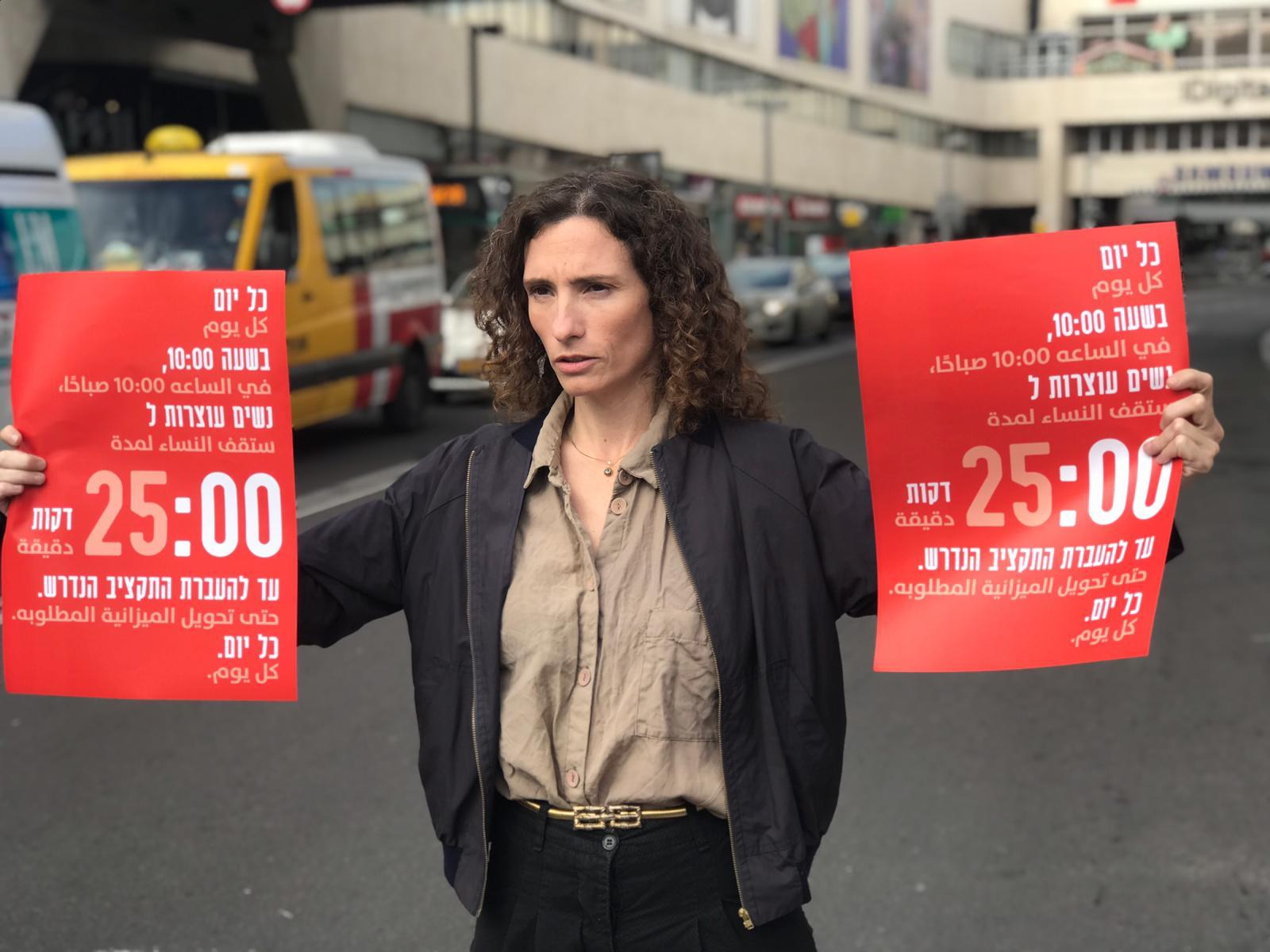 חסימת צומת הרחובות דינזגוף והמלך ג'ורג' בתל אביב, במסגרת מחאת הנשים "אני אישה אני שובתת" בדצמבר 2018